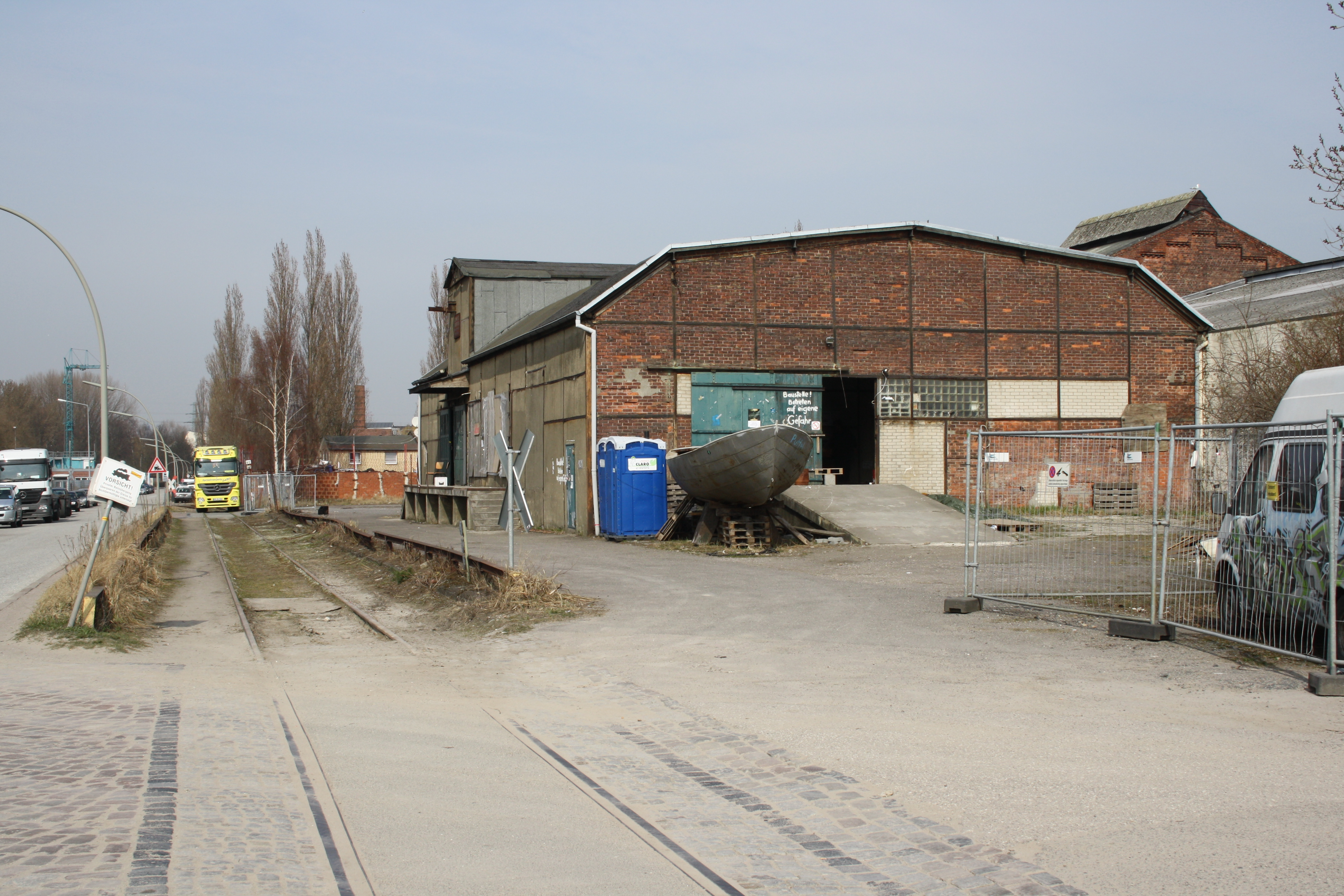 Hamburg-Wilhelmsburg, Deutschland: Die Lagerhalle, die als Drehort für Soul Kitchen diente.